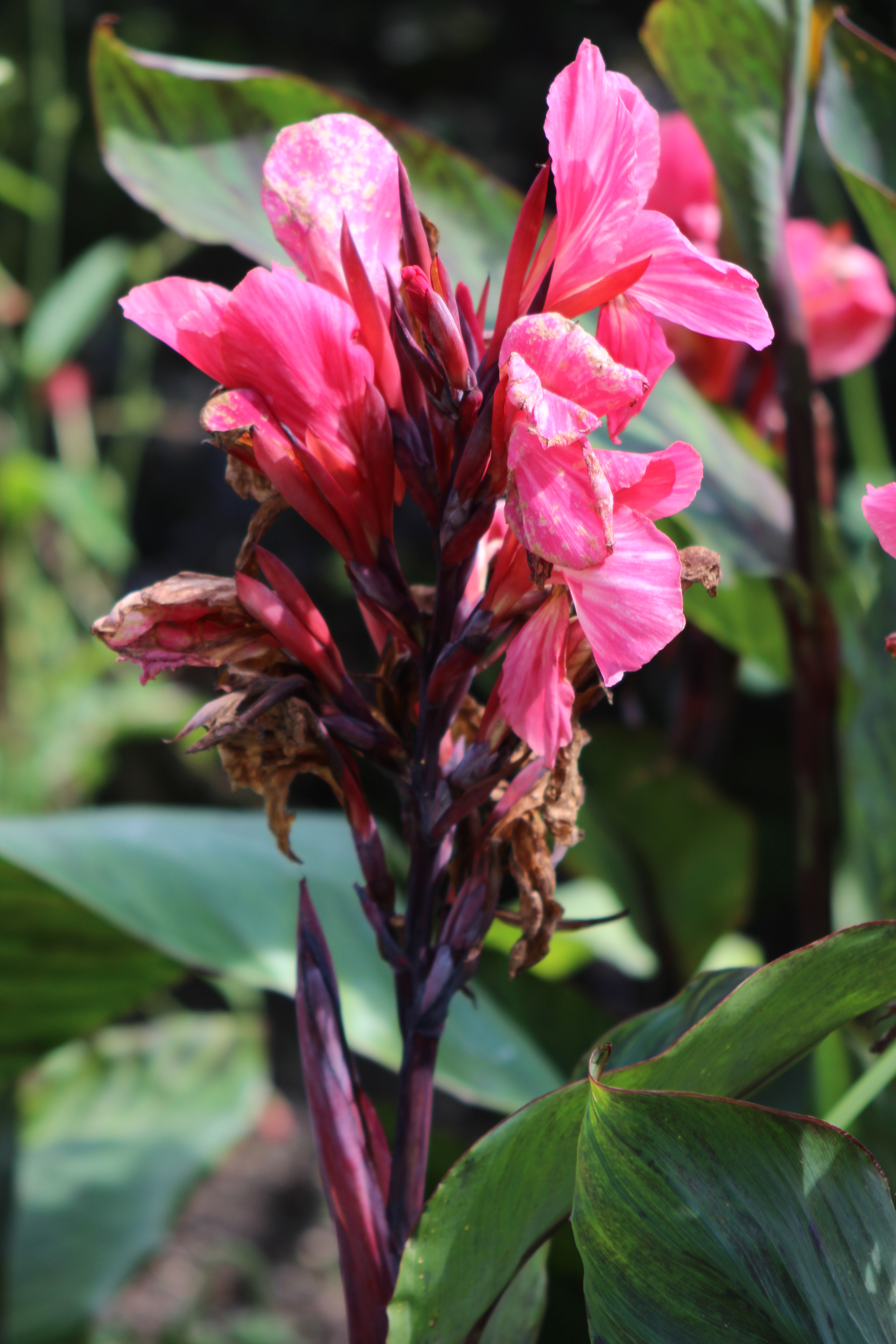 Blumenrohr "Aphrodite"